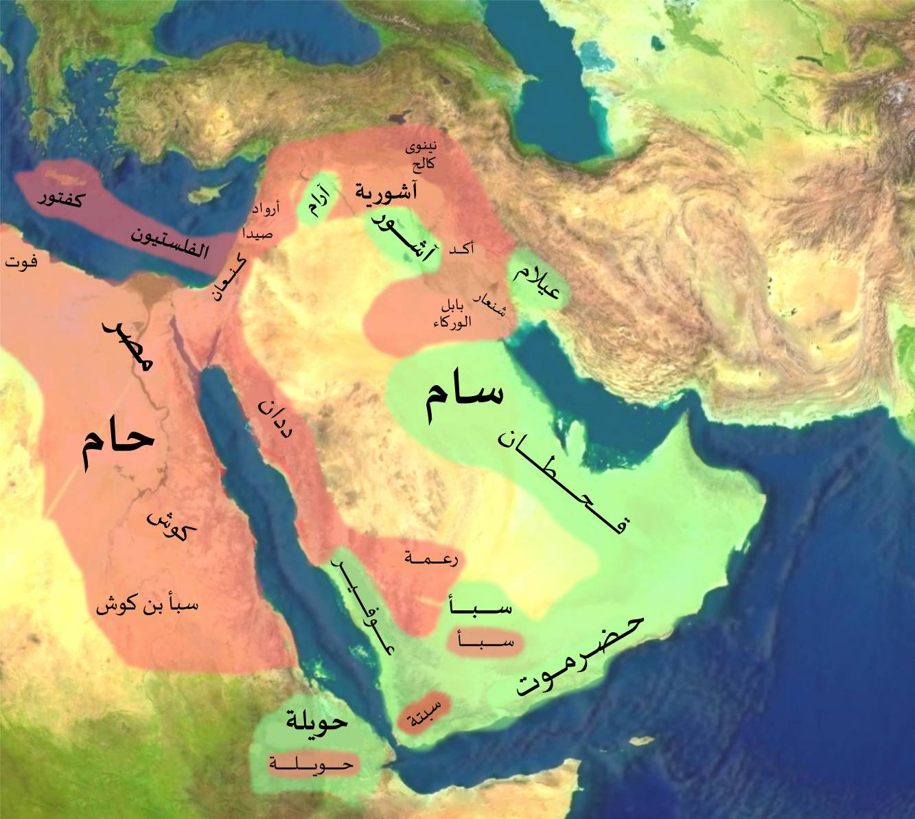 البلاد الشرق أوسطيَّة كما عرفها بنو إسرائيل قديمًا.